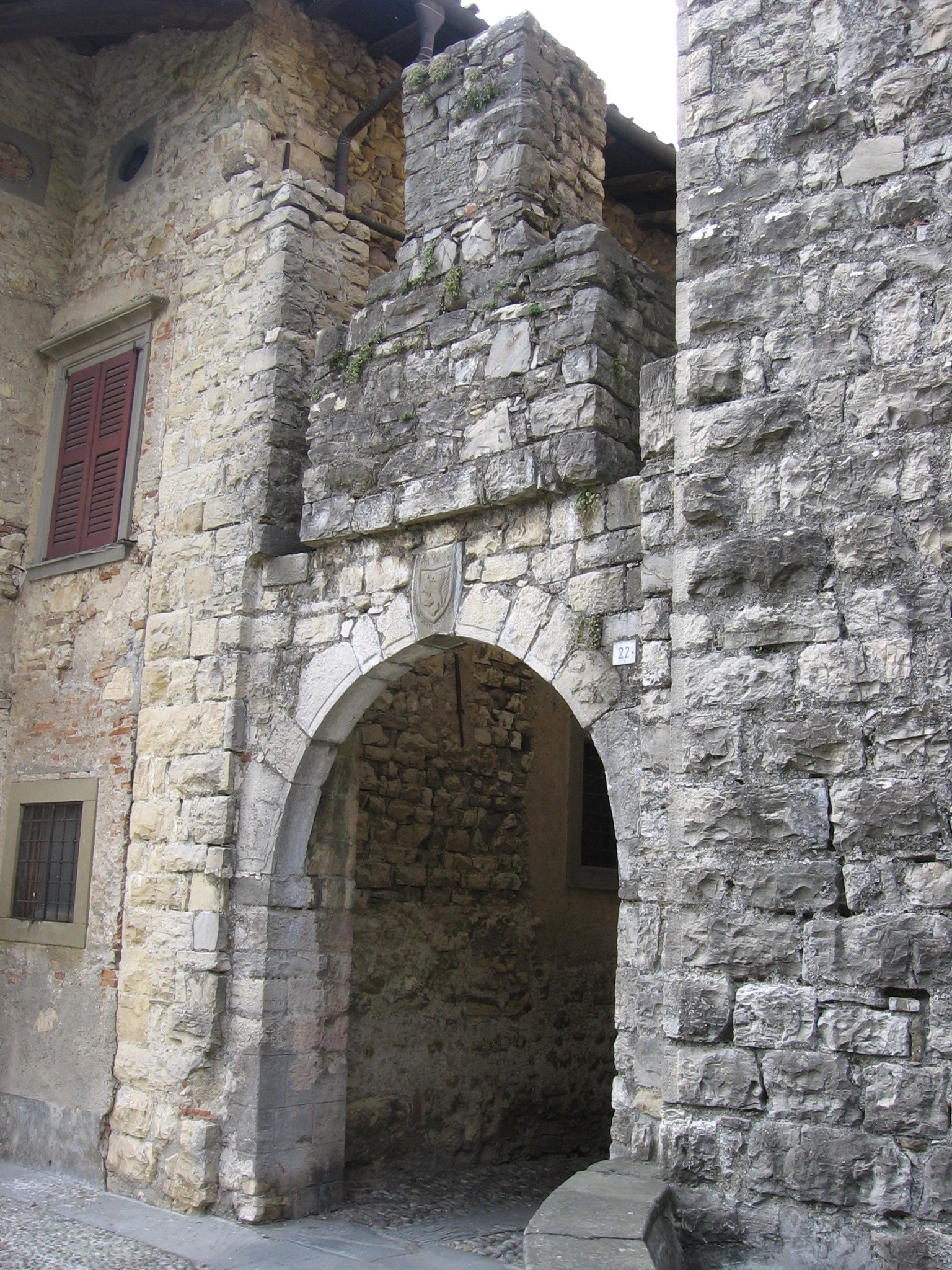 castel de'conti Calepio, Castelli Calepio, Bergamo, Italia